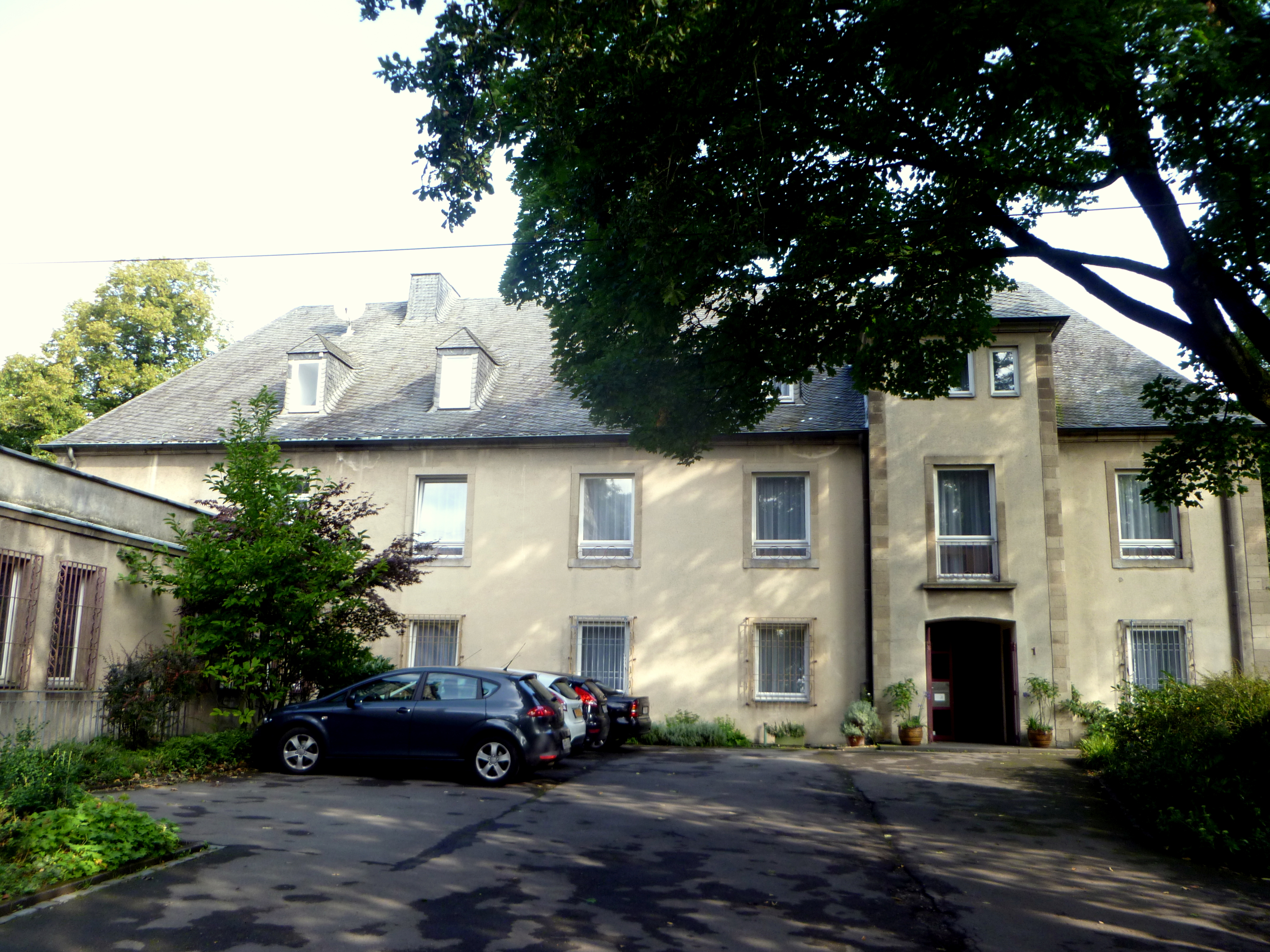 Salvatorkloster zu Aachen auf dem Salvatorberg neben der Salvatorkirche